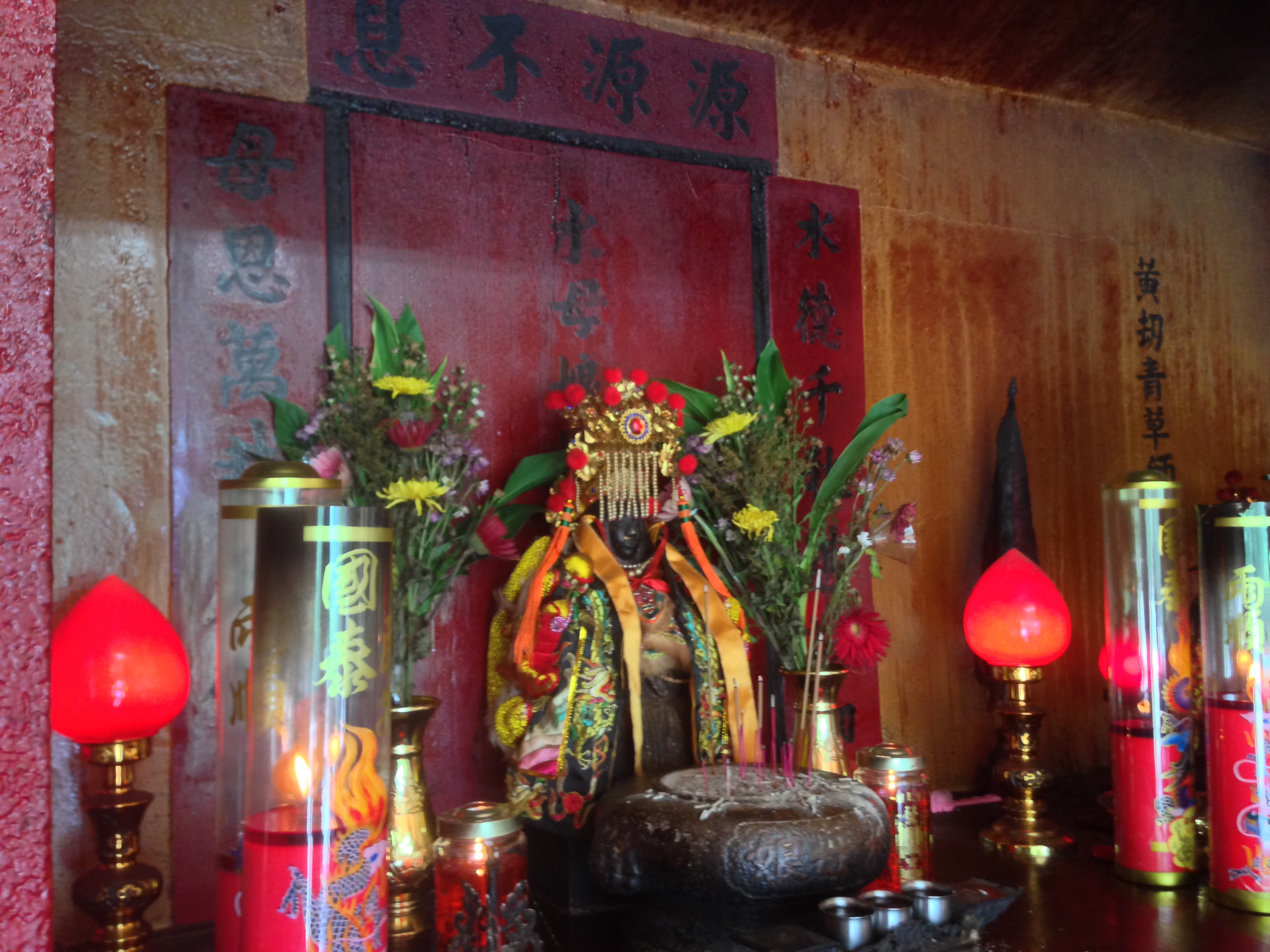 關西水母娘娘廟神像近照